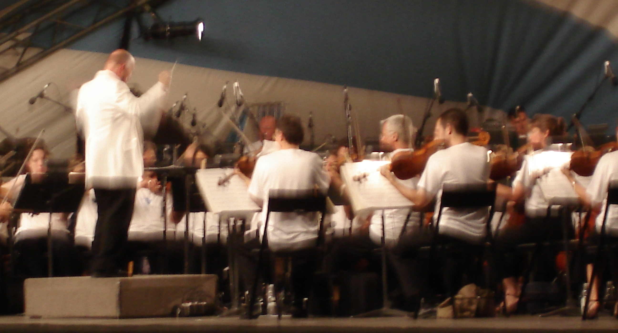 Orchestre symphonique de Montréal, dirigé par Jean-François Rivest, concerts extérieurs au parc Jean-Drapeau, juillet 2007